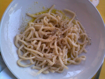 italian food pici cacio e pepe